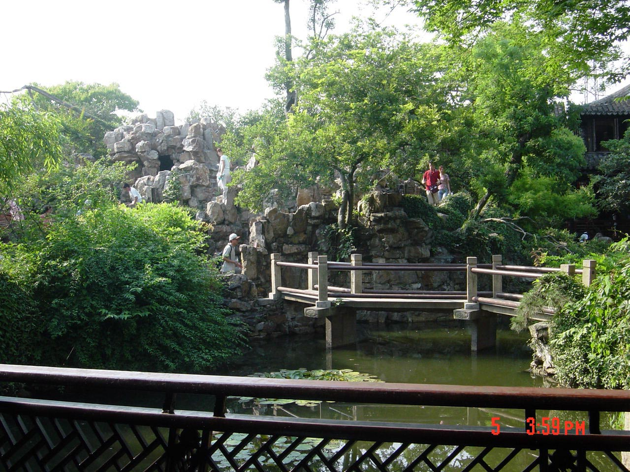 江蘇省蘇州市耦園。